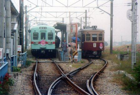 西鉄金島駅ホームに停車中の電車